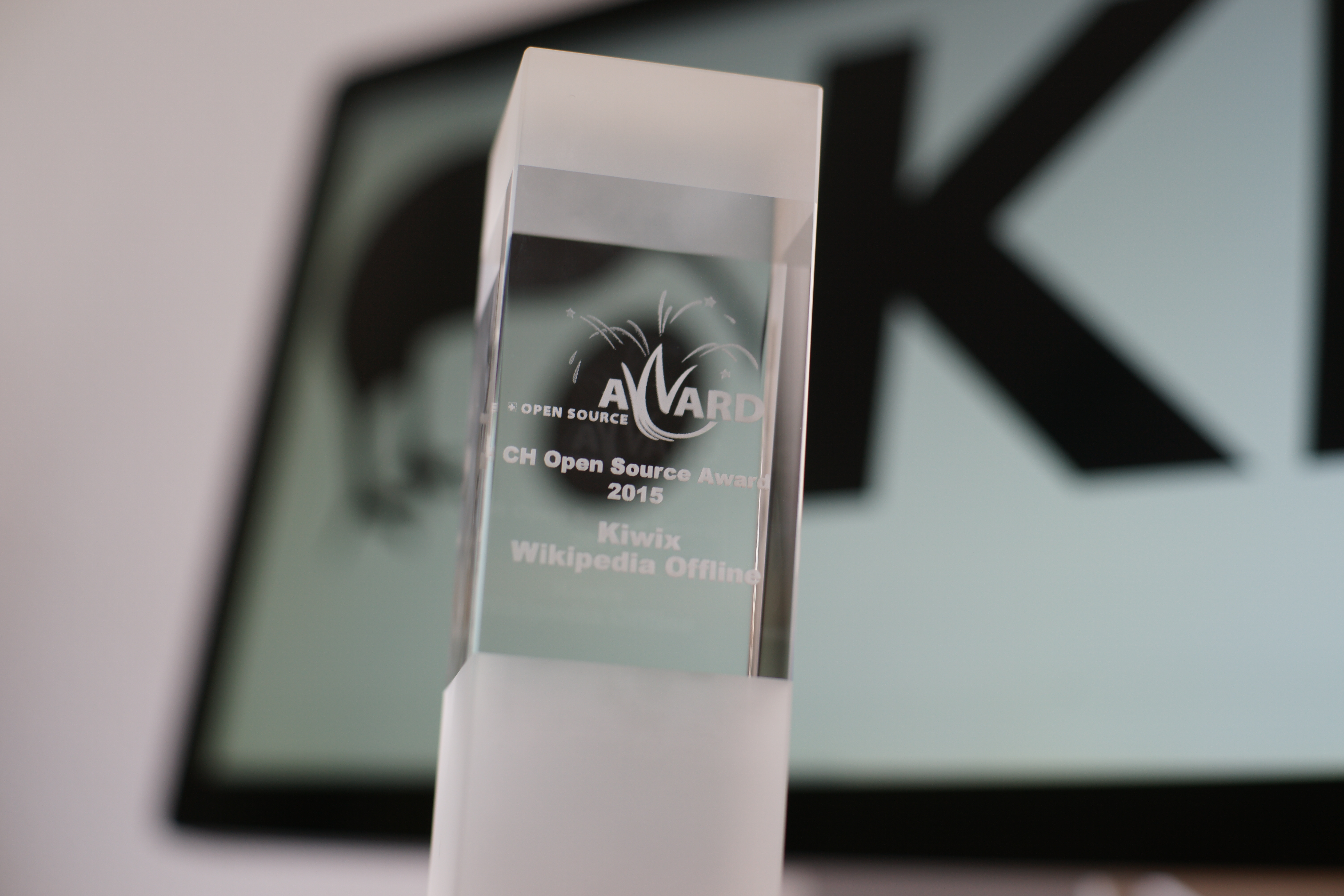 Kiwix gagne l'Open Source Award suisse en 2015